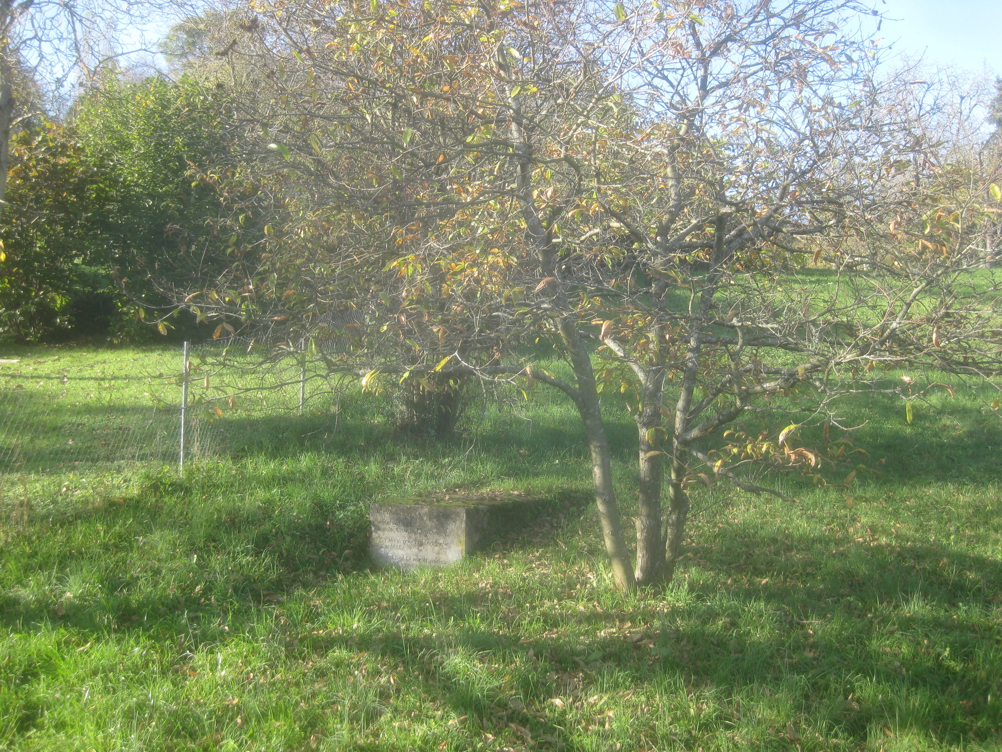 Lyrikstation „Der Wartestein“ von Heima Hasters auf dem Wartberggelände in Stuttgart.